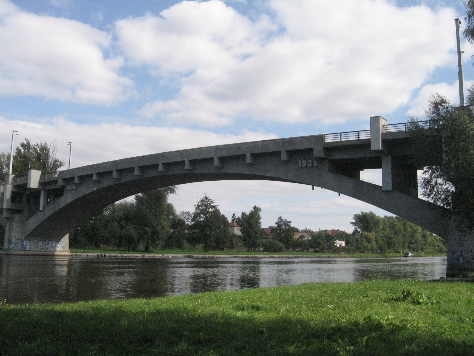 Silniční most Osvobození (Kralupy nad Vltavou), k. ú. Lobeček a k. ú. Kralupy nad Vltavou, Kralupy nad Vltavou